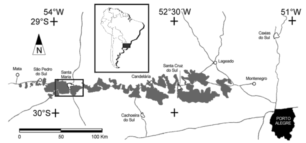 Mapa da paleorrota